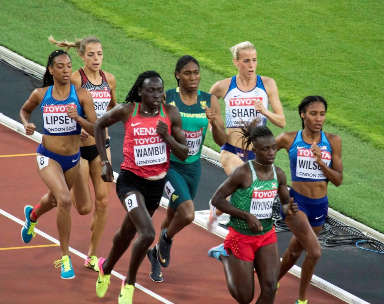 d9_8 finale 800m dames